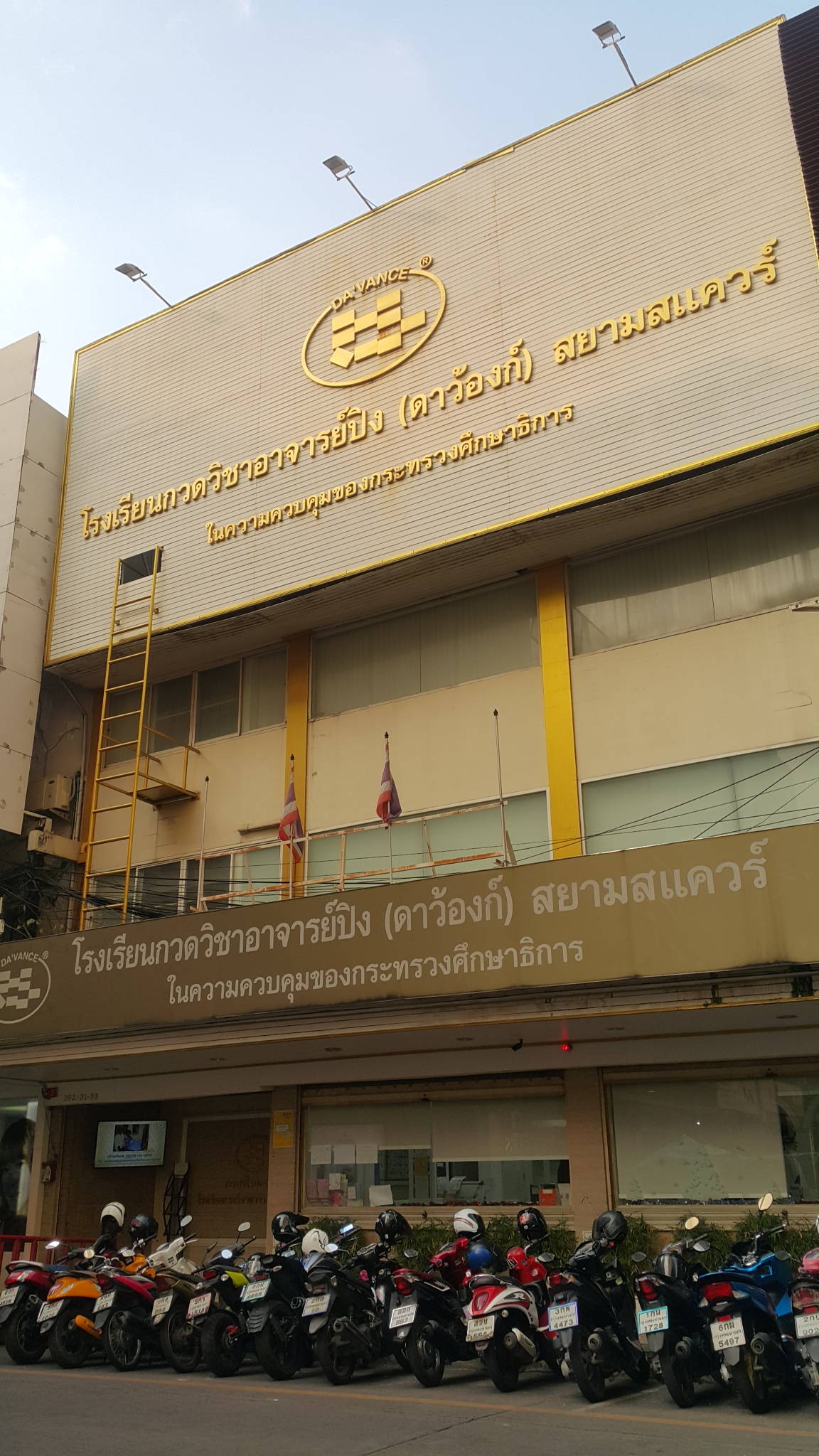 สถาบันกวดวิชาดาว้องก์ อาจารย์ปิง สยามสแควร์